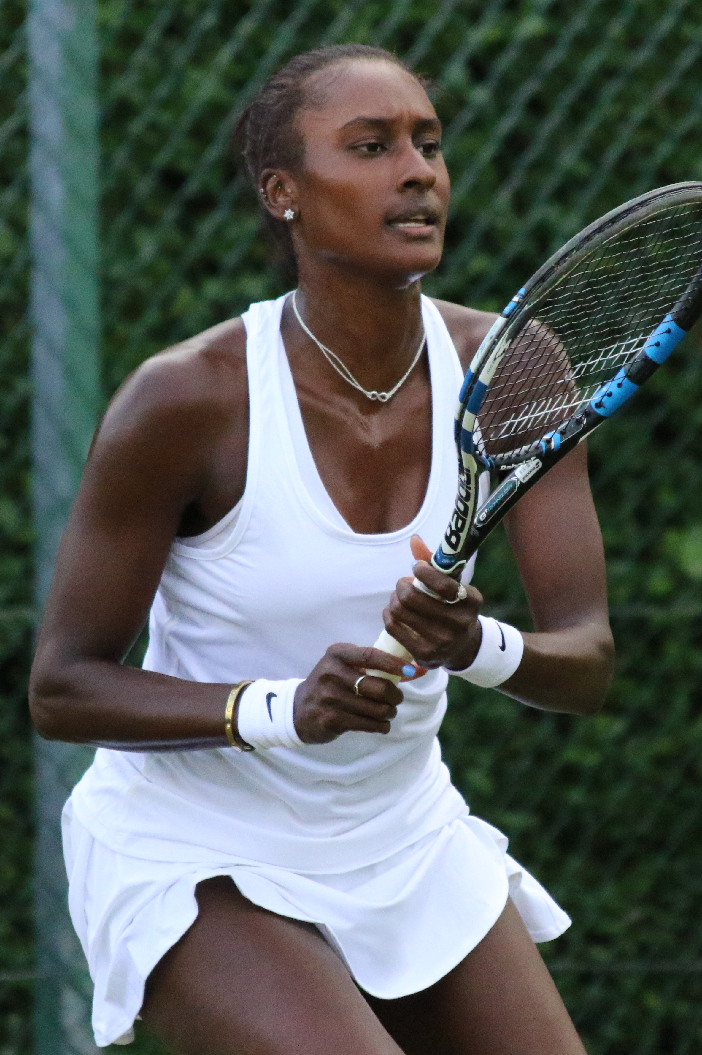 Muhammad WMQ16 (48)